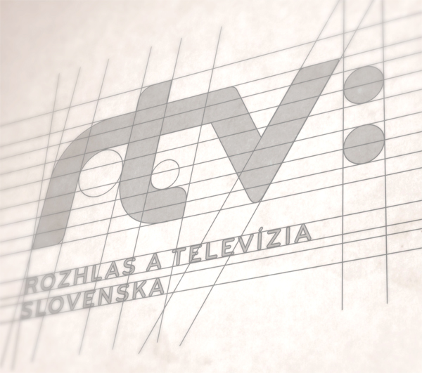 Spojenim rozhlasu a televizie v roku 2012 vznikol znak dvojbodiek, ktorý mal symbolizovať kontinuitu, modernosť a integritu dvoch suverénnych verejnoprávnych medii